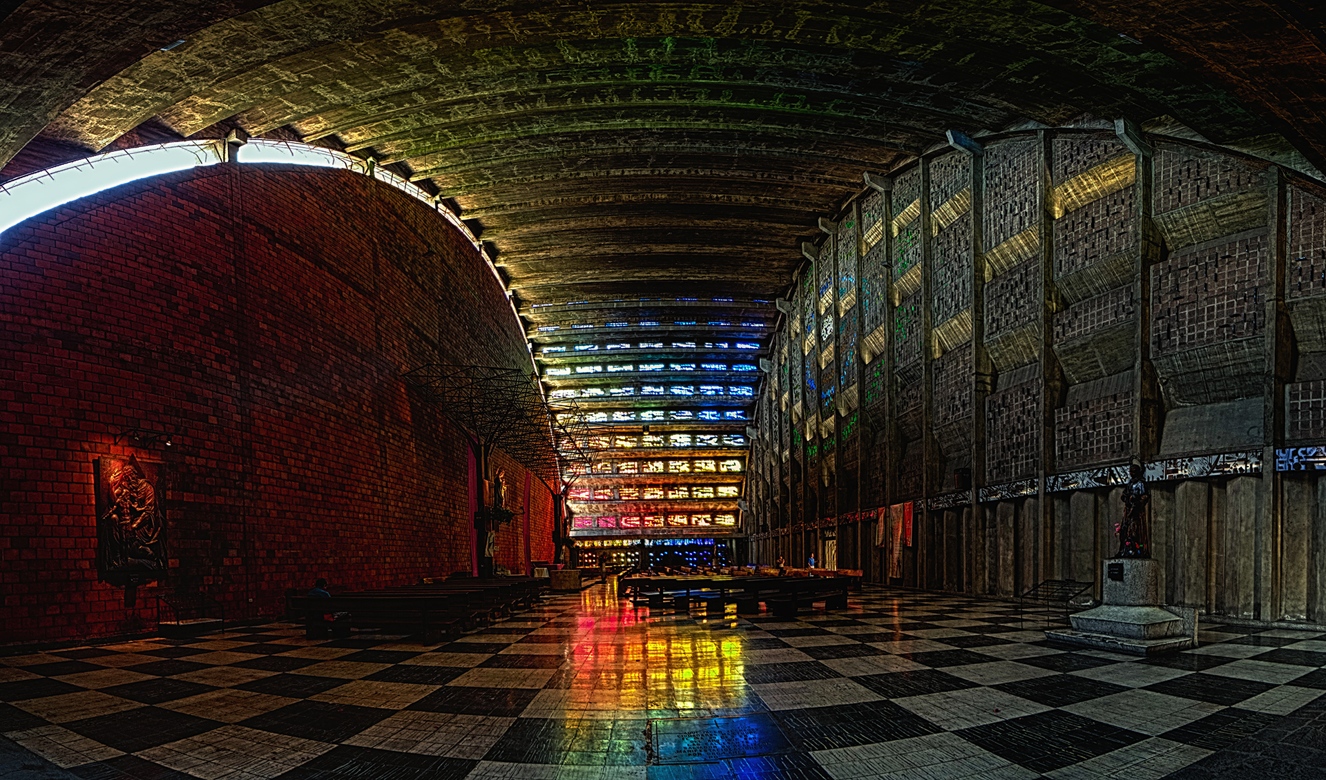 panorámica del interior de la Iglesia El Calvario en Centro Histórico de San Salvador.